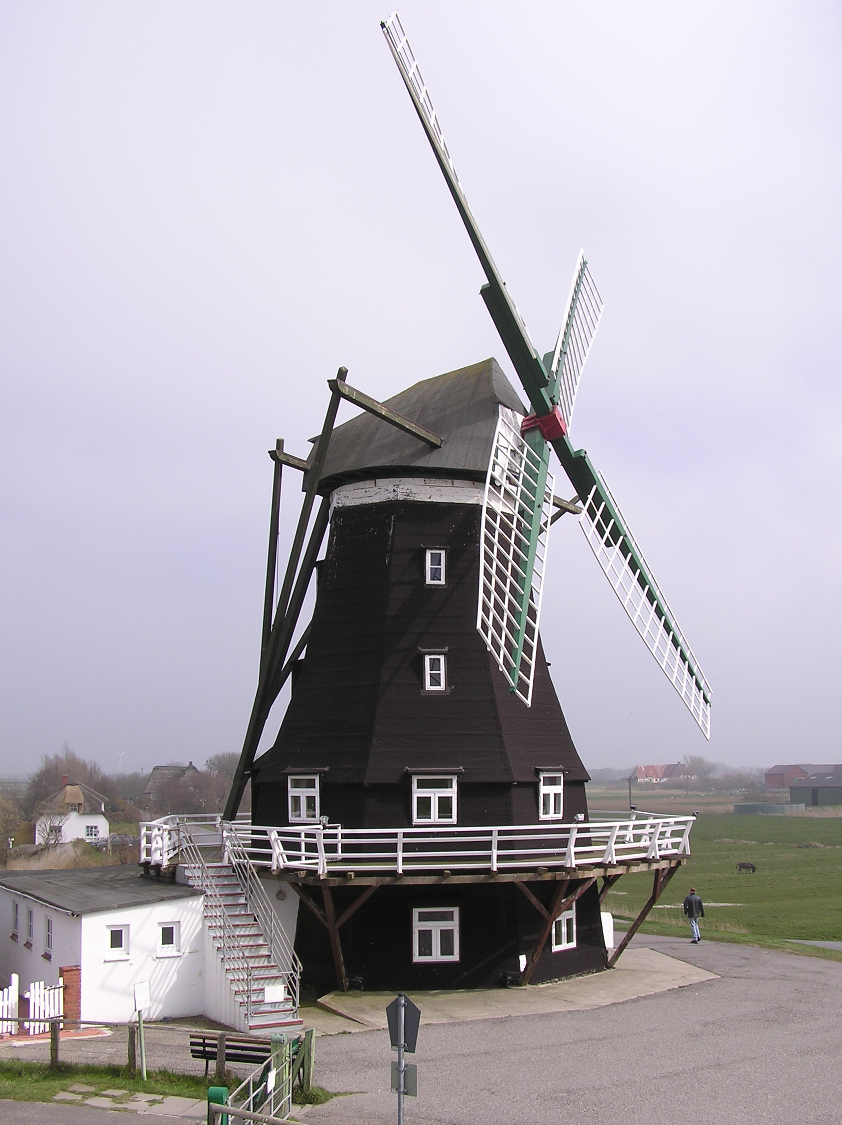 Brunsbüttelkoog